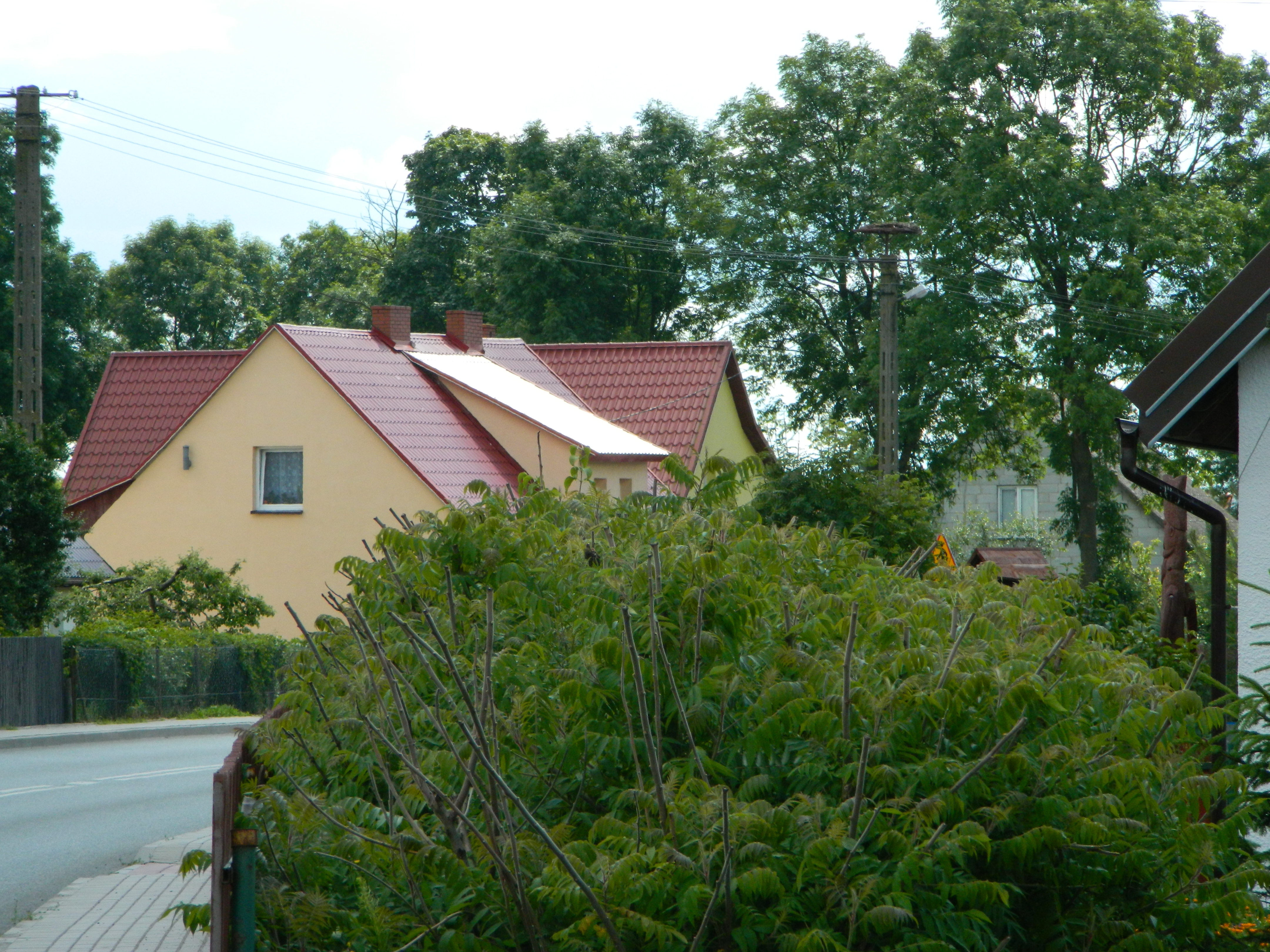 Bocianie gniazdo, Występ 38